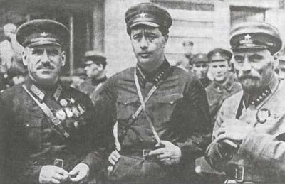 (слева направо): В.К.Блюхер, Семён Израилевич Западный (НКВД) и Терентий Дмитриевич Дерибас (НКВД)